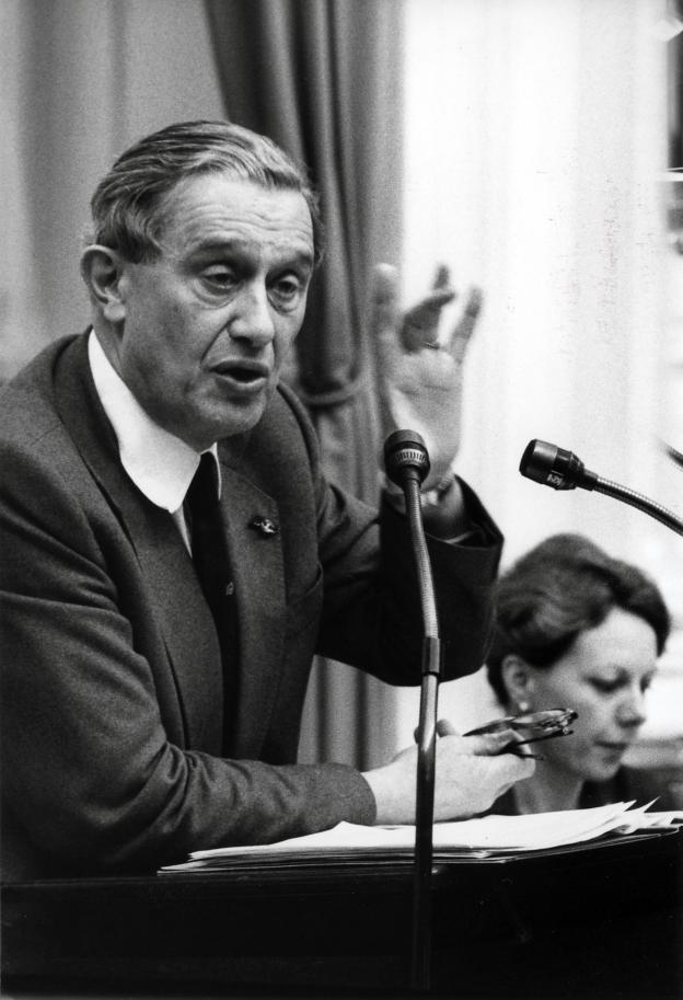 VVD Minister van Verkeer en Waterstaat D.S. Tuijnman en Neelie Kroes Den Haag, Nederland, 24 januari 1980.